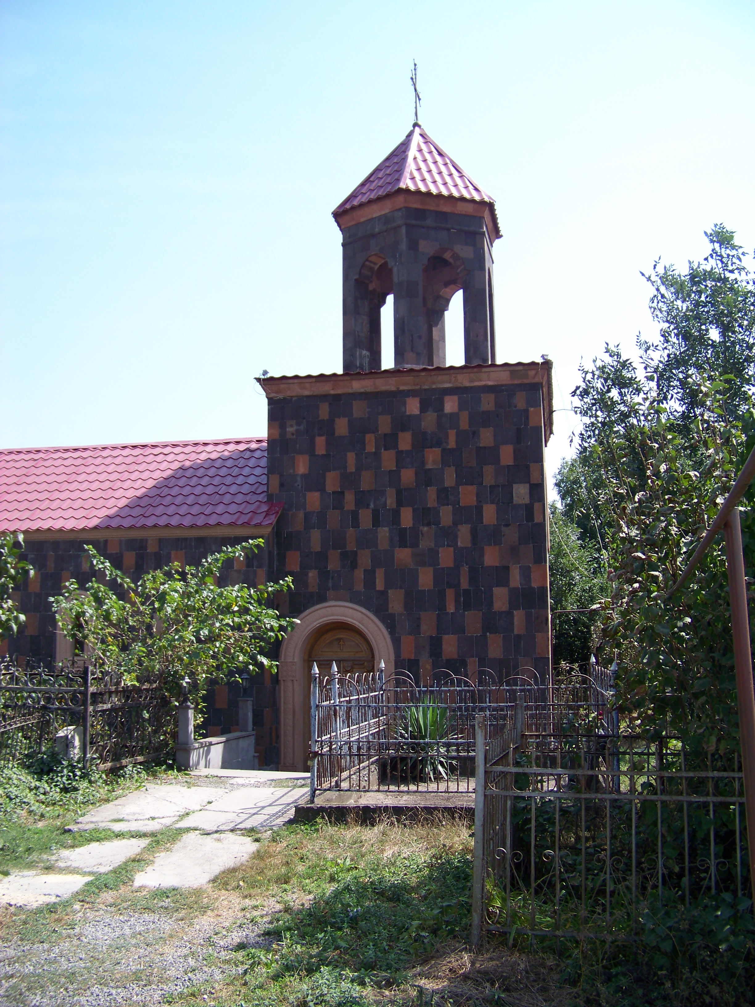 ზღუდერის წმინდა გიორგის ეკლესია